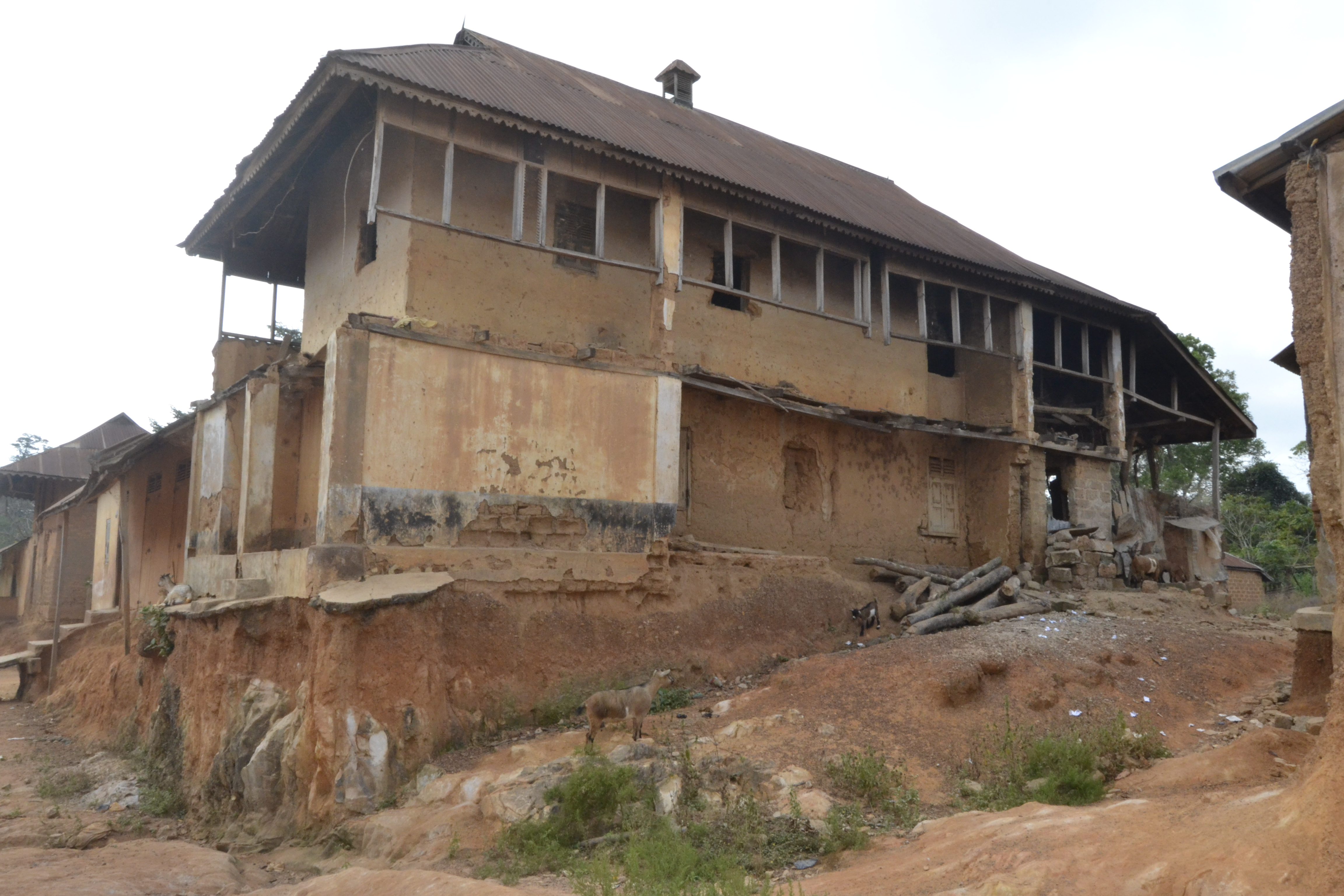 Il s'agit d'une maison Abron construite en brique de terre en étage.